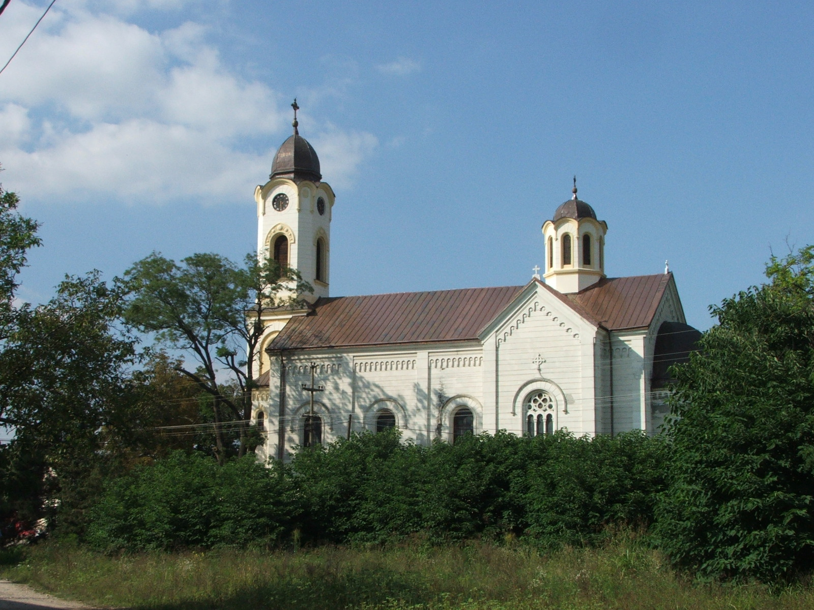 Orthodox Church in Belegiš, Serbia, Vojvodina/L'église orthodoxe de Belegiš, Voïvodine, Serbie